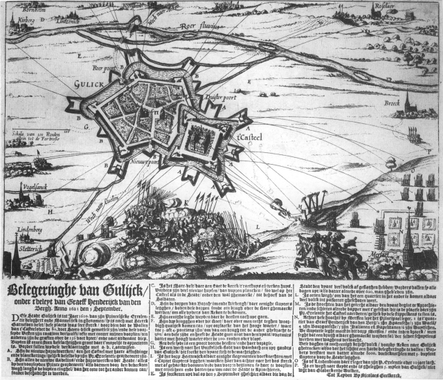 Jülich 1621-1622